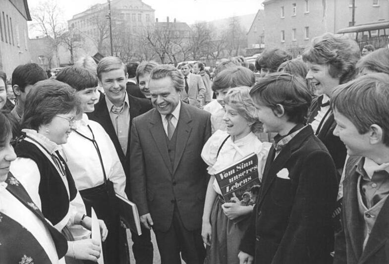 Zschorlau, Jugendweihe, Lothar Kolditz ADN-ZB 1.4.84 Bez. Karl-Marx-Stadt: Jugendweihe. Rund 12 800 Mädchen und Jungen unserer Republik erhielten an diesem Wochenende ihre Jugendweihe. Viel Glück für den neuen Lebensabschnitt wünschte Prof. Dr. Lothar Kolditz, Präsident des Nationalrates der Nationalen Front der DDR (M) den 47 Schülern der Zschorlauer Otto-Kempel-Oberschule (Krs. Aue) (Schdt) Abgebildete Personen: Lothar Kolditz, Chemiker, Vorsitzender der Nationalen Front